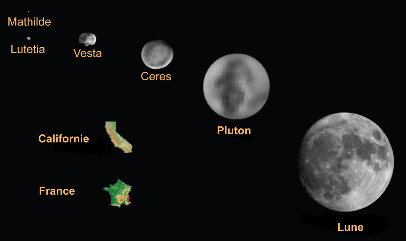 Comparaison des tailles de Vesta, Céres et la Lune